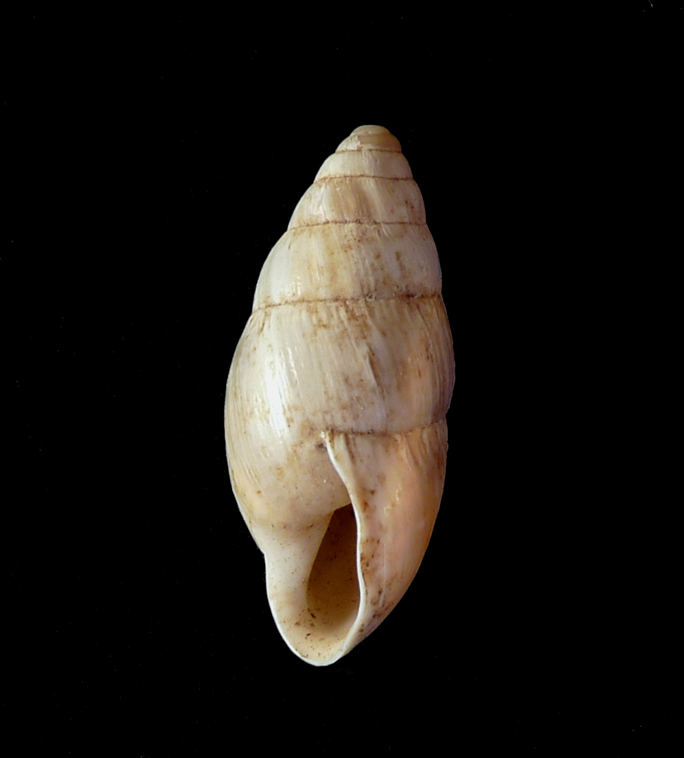 No, this is not a Rissoid, it is a pulmonate land snail, North-Wales/Britain Ena montana, determined 04 June 2011 by Francisco Welter-Schultes